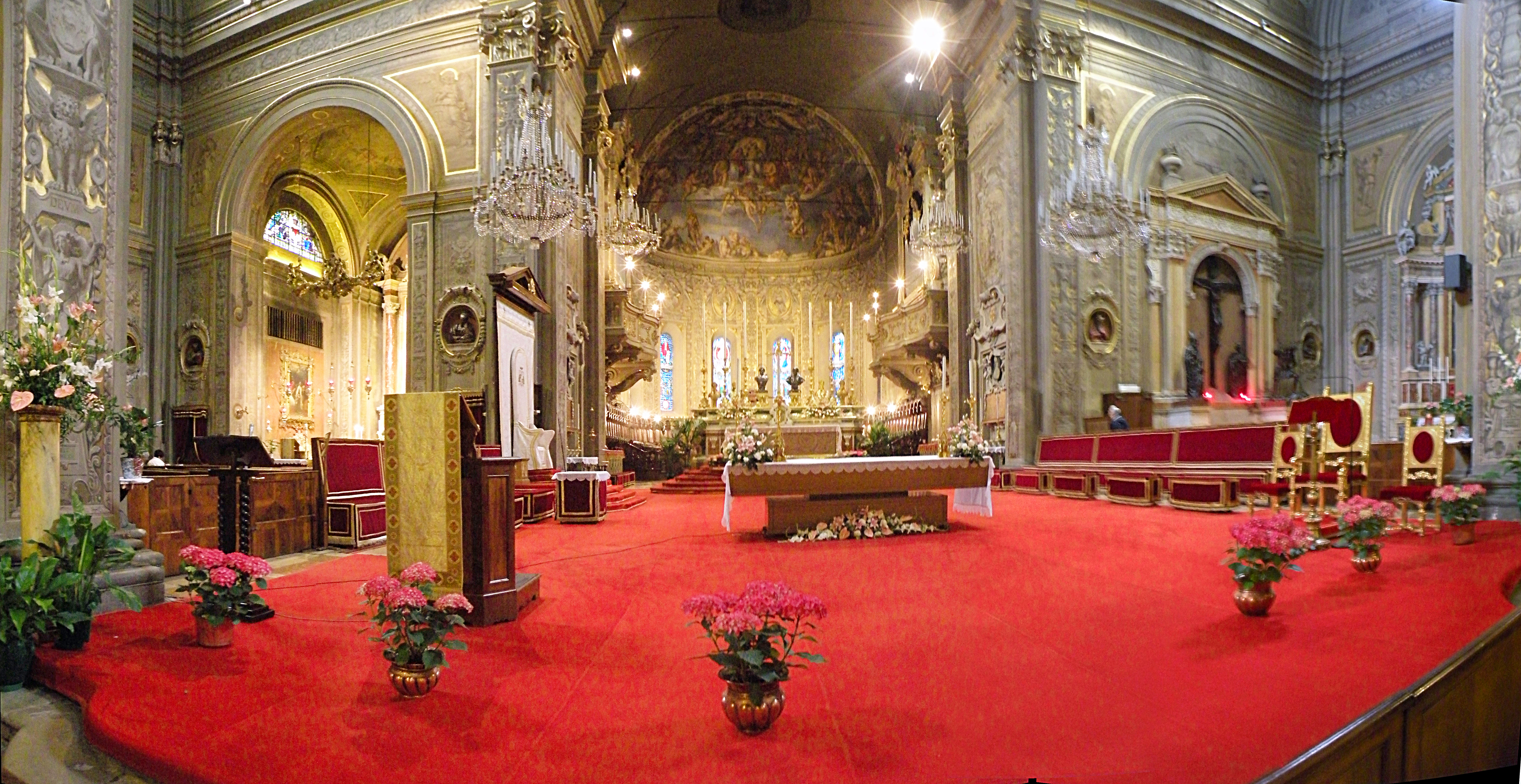 Интерьер собора San Giorgio в Ферраре